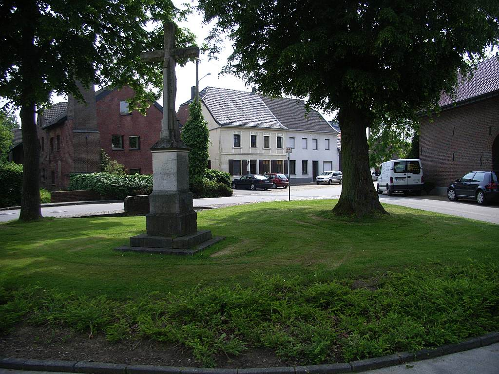 Erkelenz-Oerath, NRW